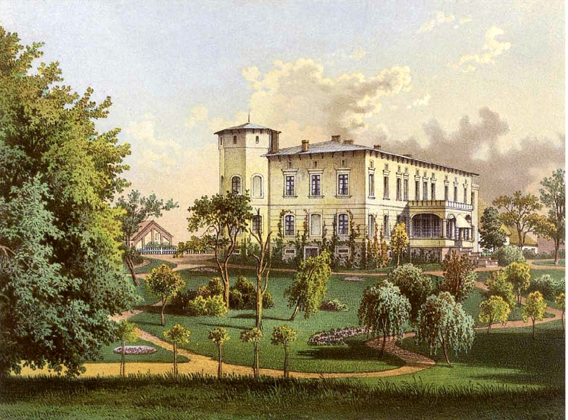 Schloss Gorzechowko, Kreis Strasburg, Provinz Preussen, Lithografie aus dem 19. Jahrhundert